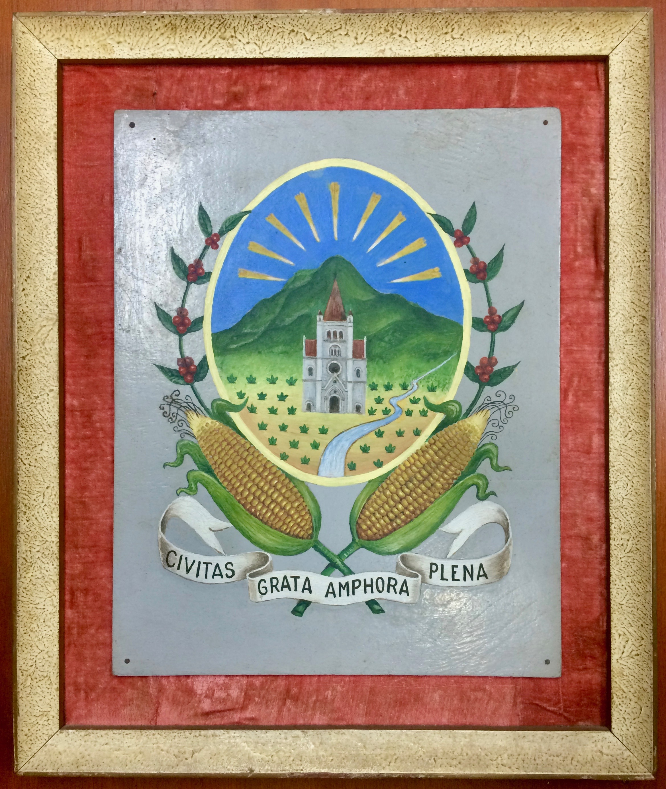 Pintura original del Escudo de Sonsón presentada al Honorable Concejo Municipal por el Dr. Alfredo Correa Henao en 1957. Conservada en la pinacoteca del Centro de Historia de Sonsón.